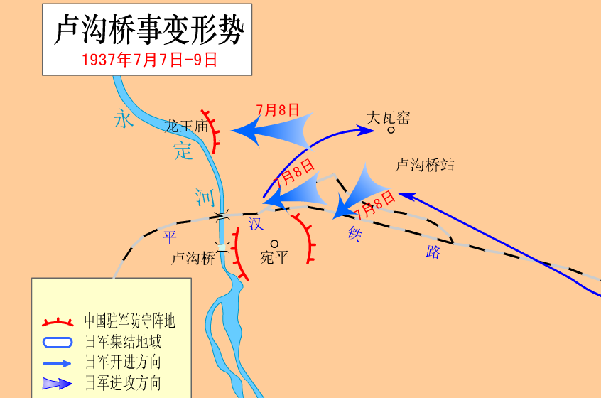 七七卢沟桥事变形势图